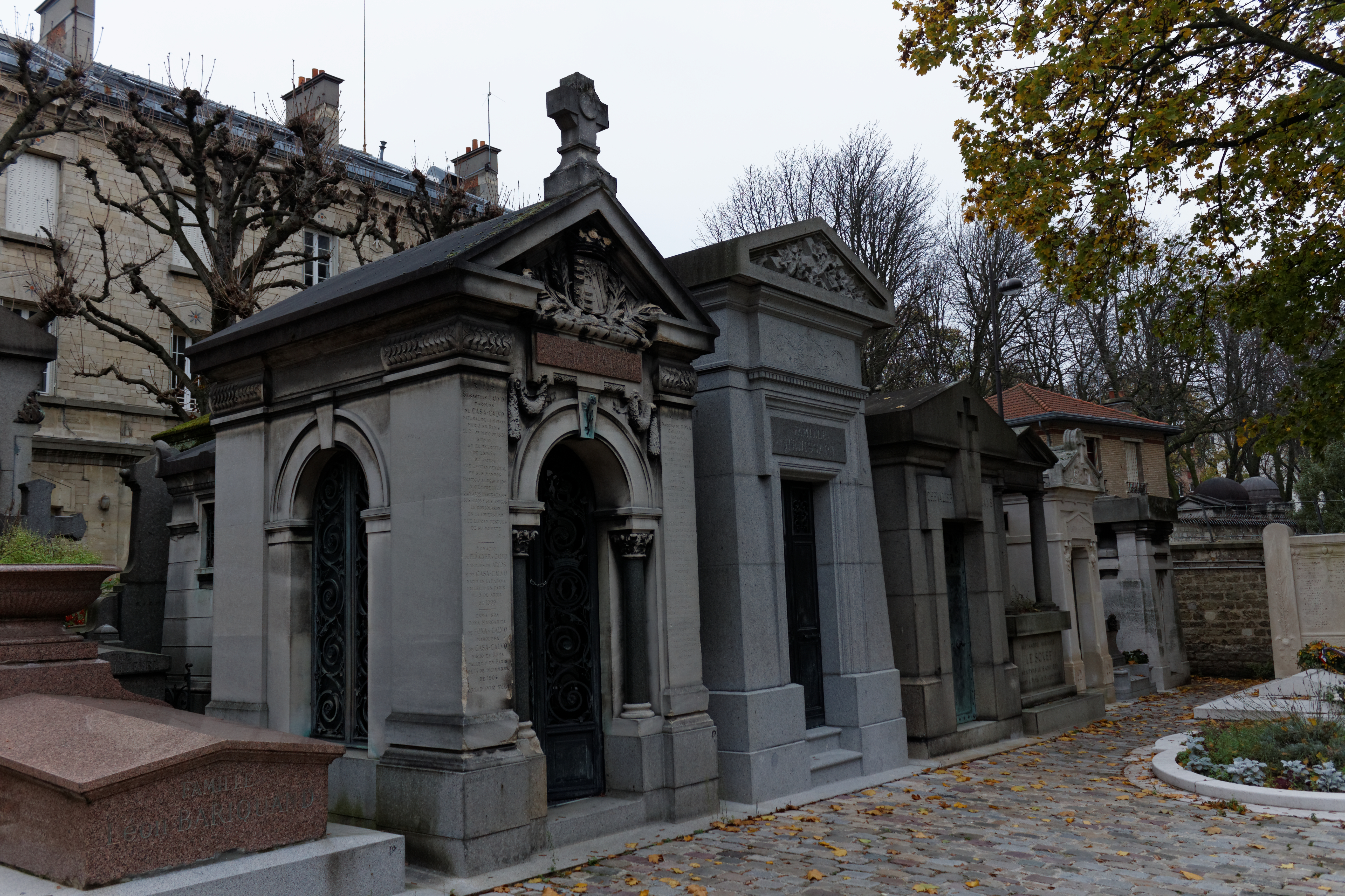 Chapelle